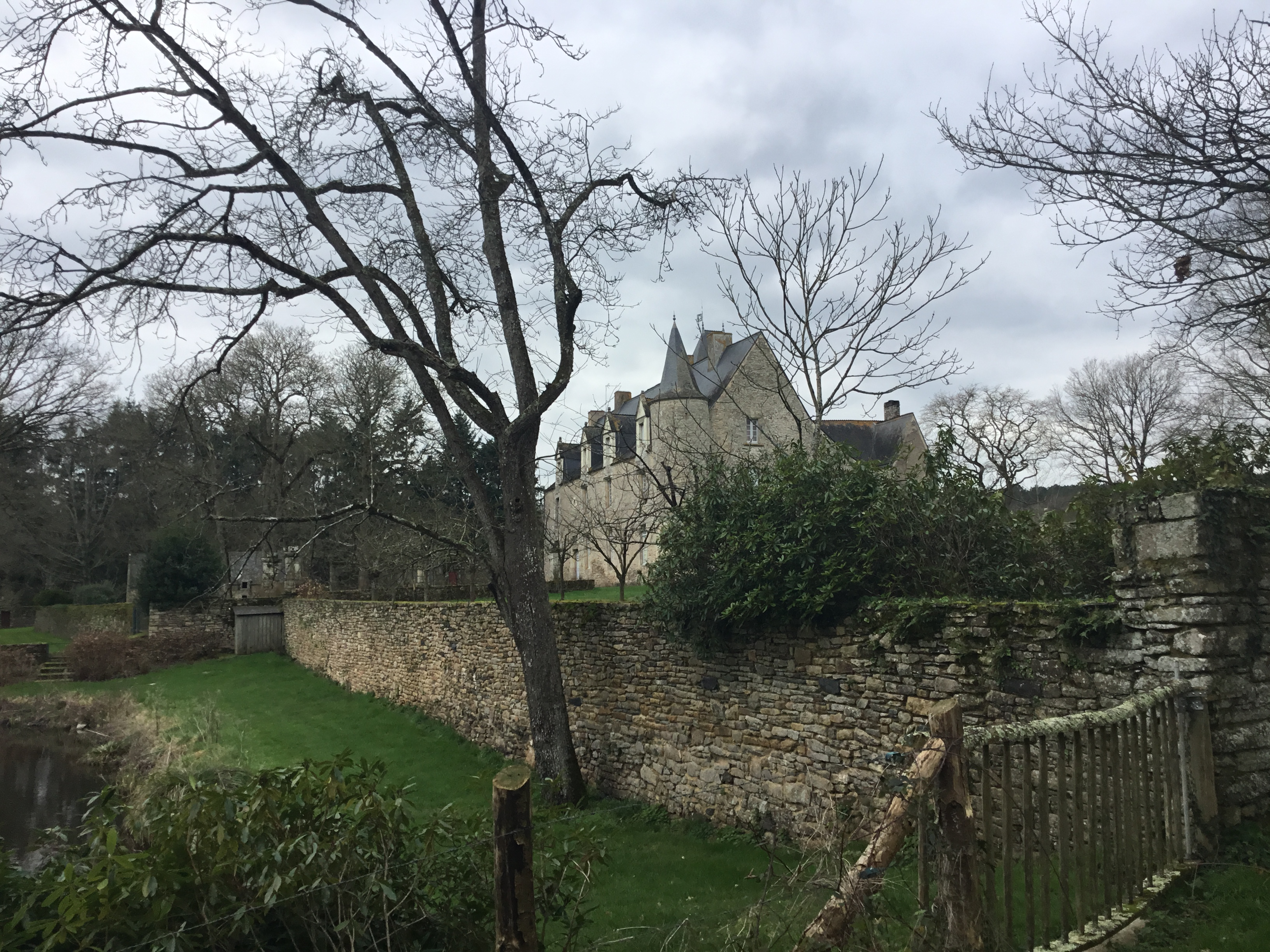 Vue de côté du château du Vaudequip. .